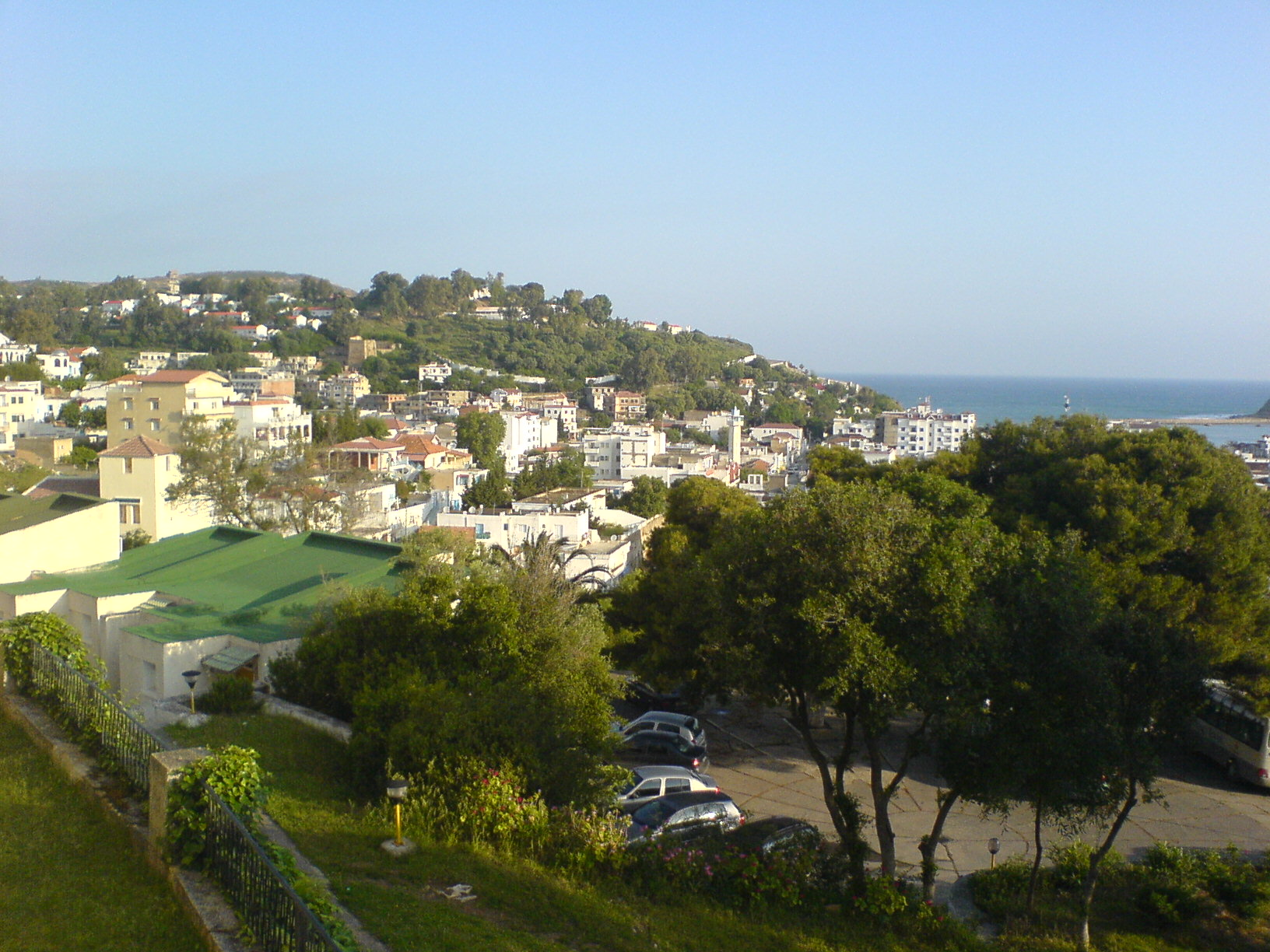 Photo du centre-ville de Tabarka